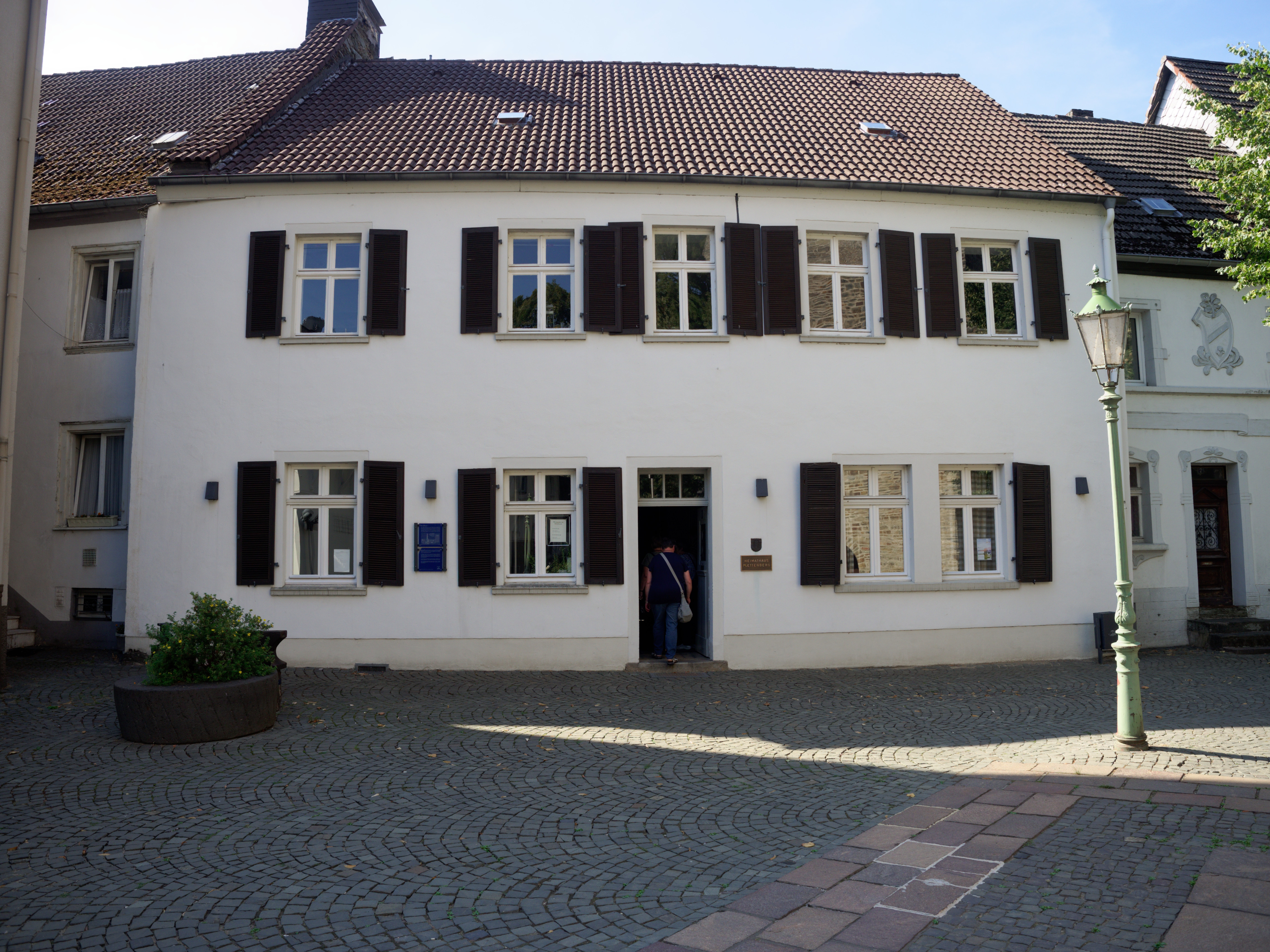 Heimathaus des Heimatvereins, Kirchplatz 8, Plettenberg.